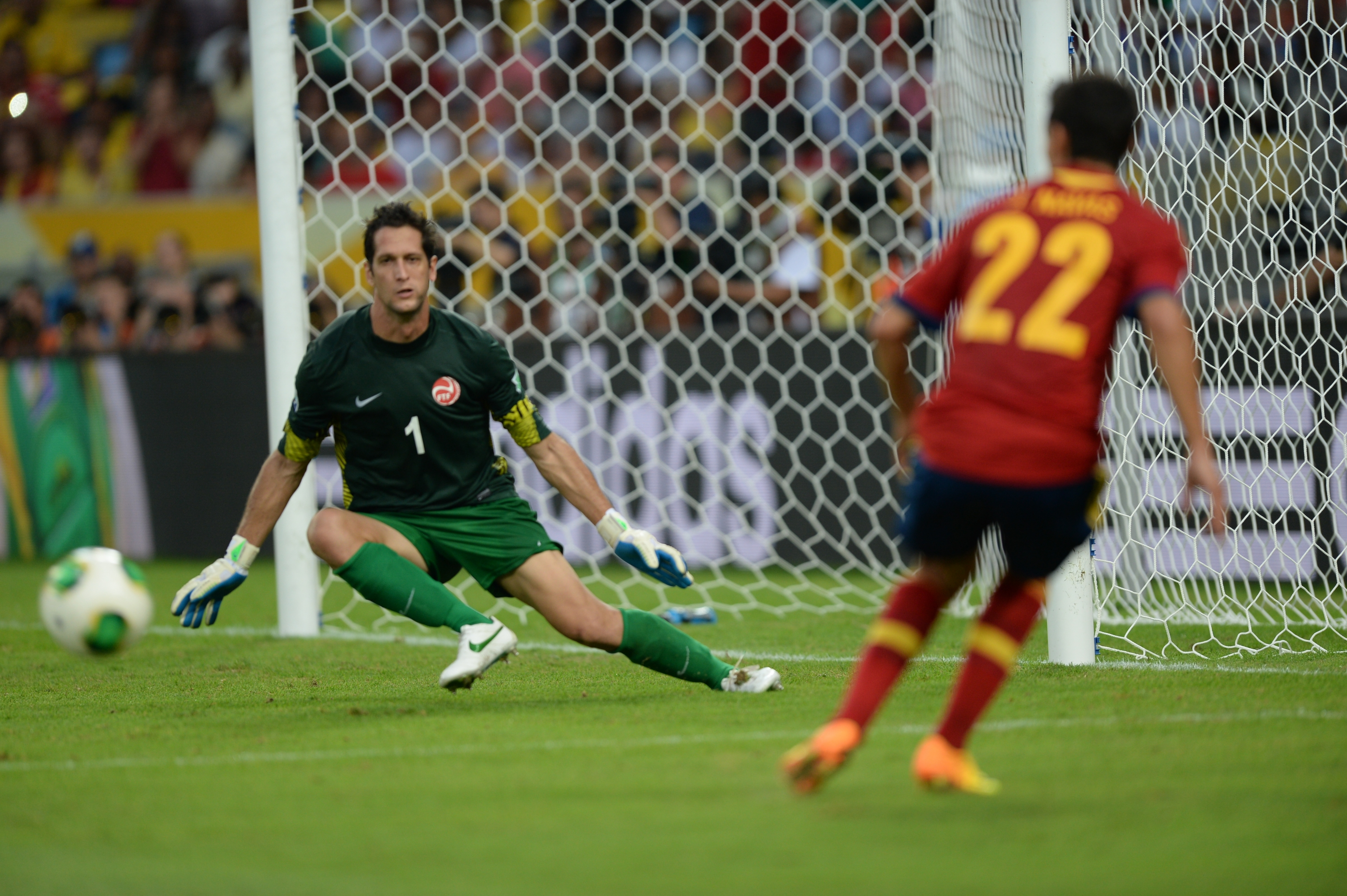 Espanha e Taiti se enfrentam na Copa das Confederações 2013